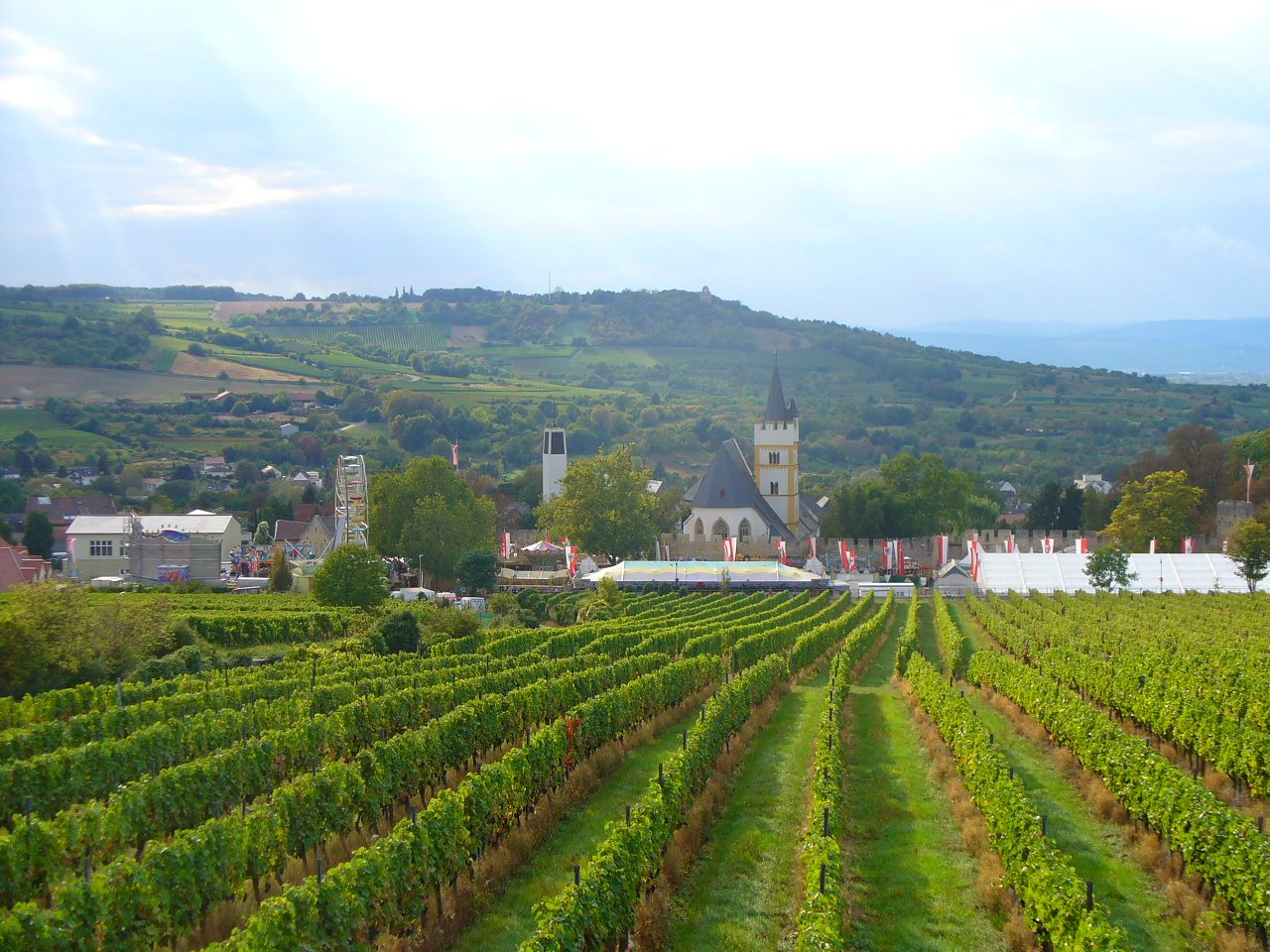 Burgkirche mit Rotweinfest im Oktober 2009